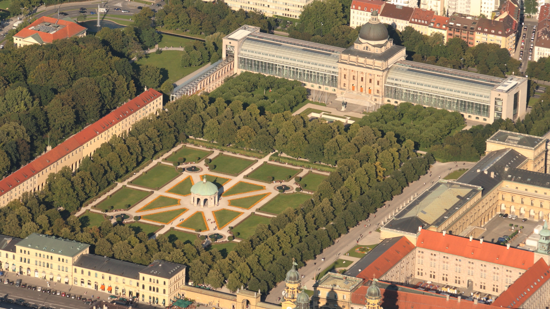 München Luftaufnahme vom Hofgarten mit der bayerischen StaatskanzleiThis is a photograph of an architectural monument.